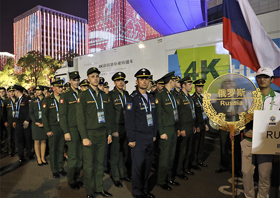 Сборная ВС РФ приняла участие в открытии Всемирных военных игр в Ухане